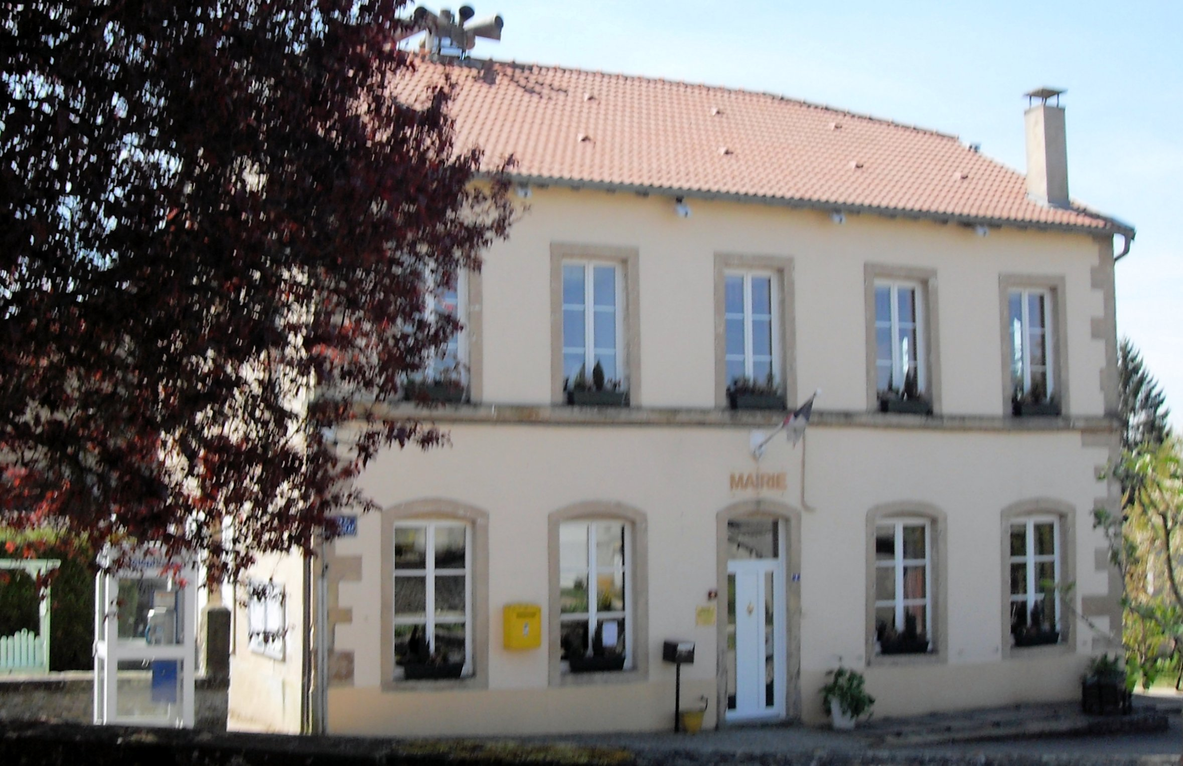 La mairie de Saulxures-lès-Bulgnéville